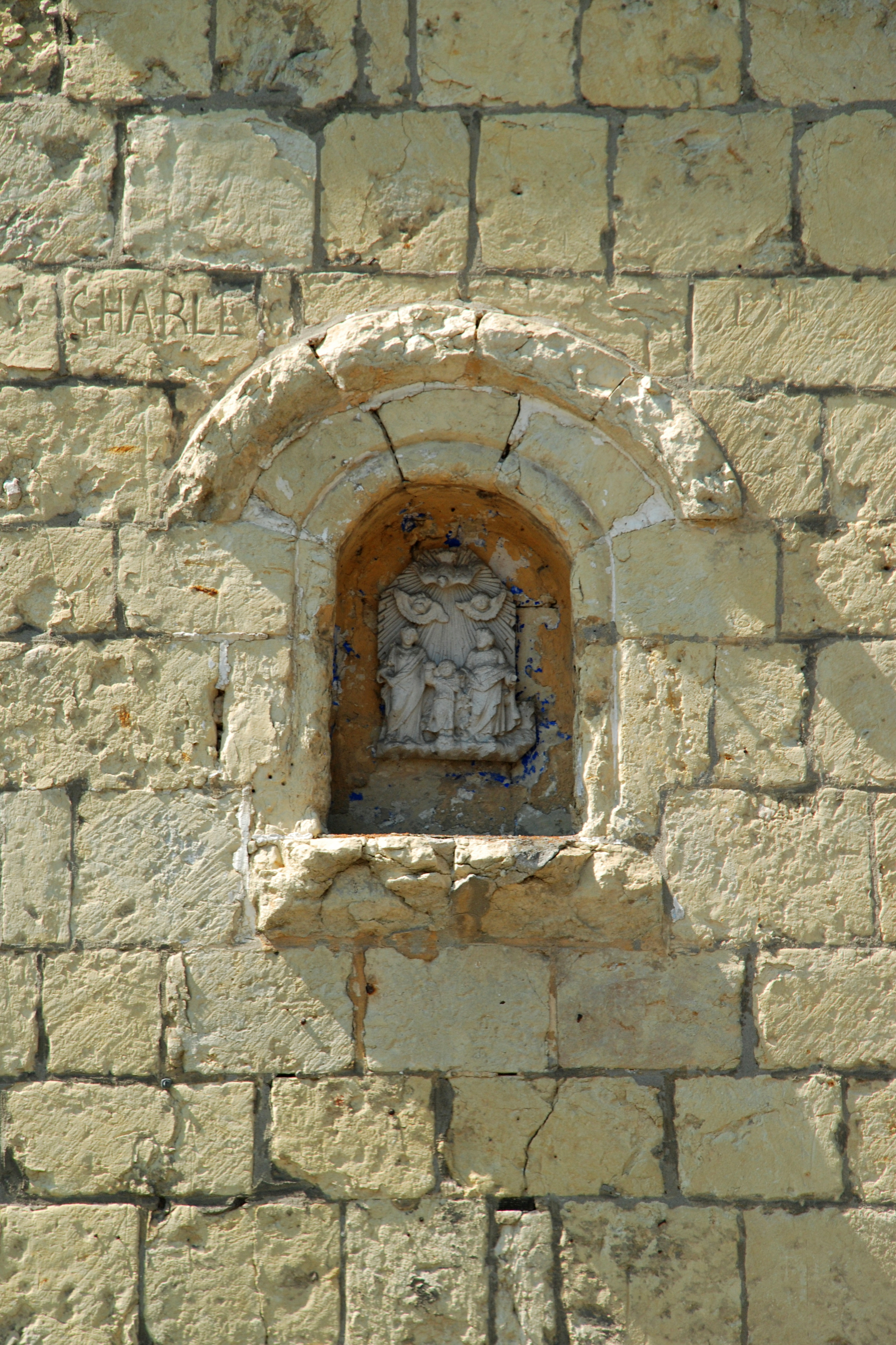 Belgique - Brabant wallon - Hélécine - Linsmeau - Chapelle Notre-Dame de la Colombe